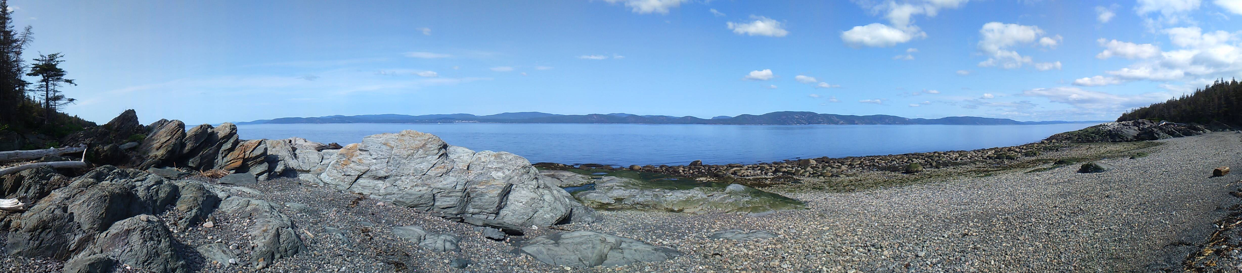 Vue panoramique de la plage proche de la Pointe aux Cayes sur l'Île-aux-Lièvres, Québec, Canada